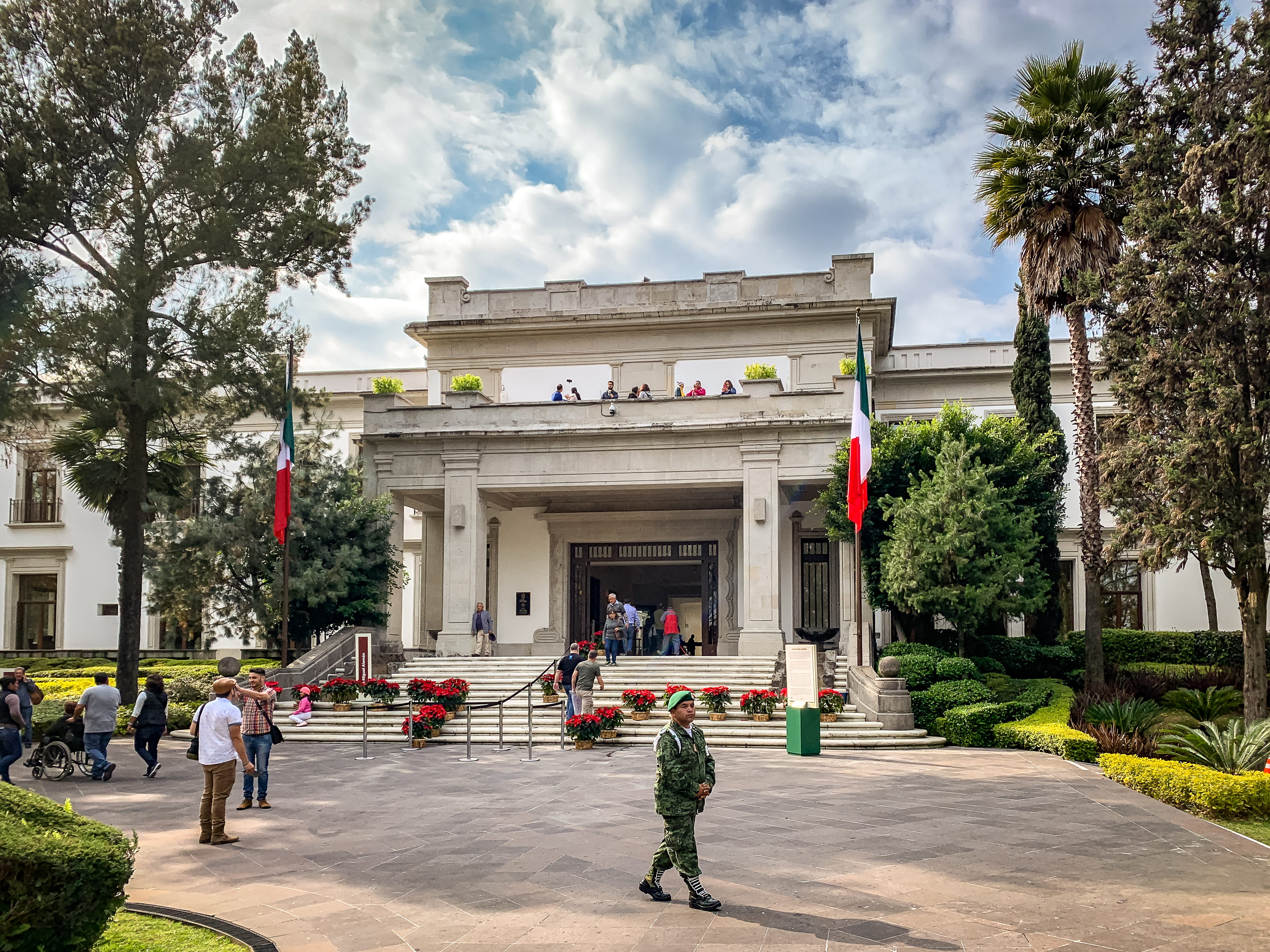 Fotografía de Los Pinos, ahora que es un espacio cultural abierto al público dentro del Bosque de Chapultepec.